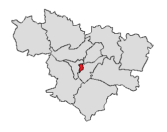 Localisation du canton d'Agen-Centre